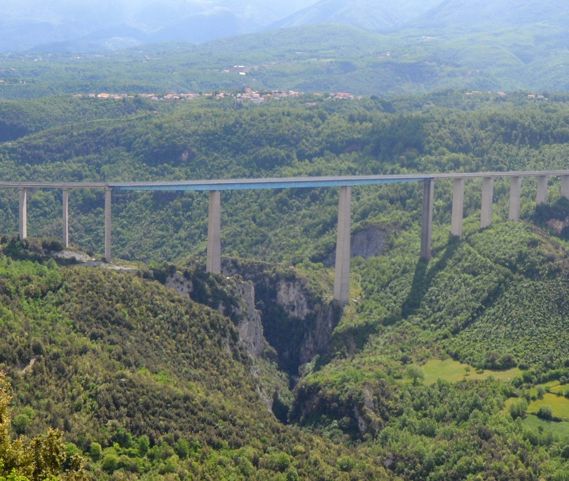 Viadotto Italia sull'autostrada A3